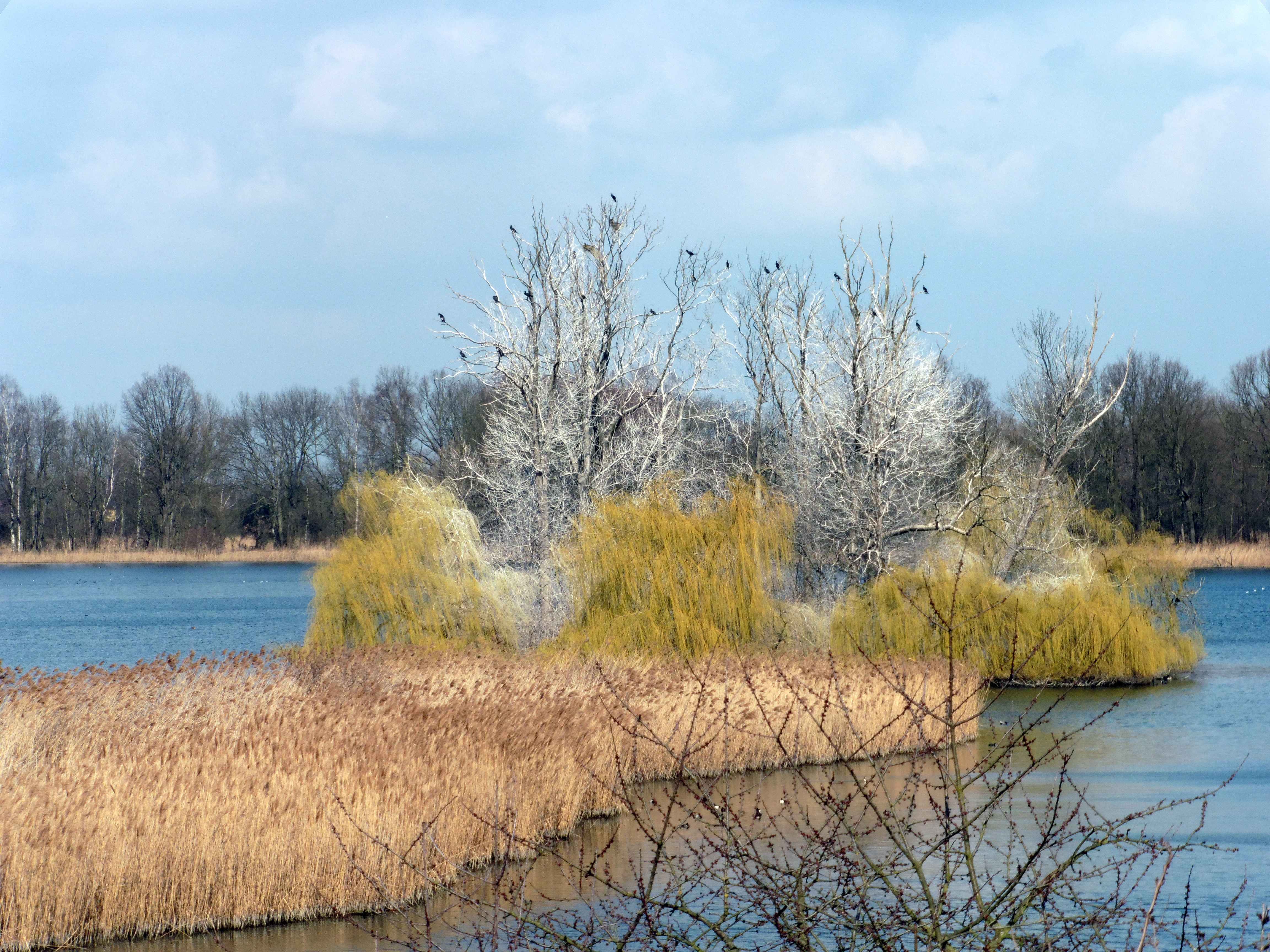 NABU Schutzgebiet im Kreis Altenburger Land, Teichgebiet, 58,7ha